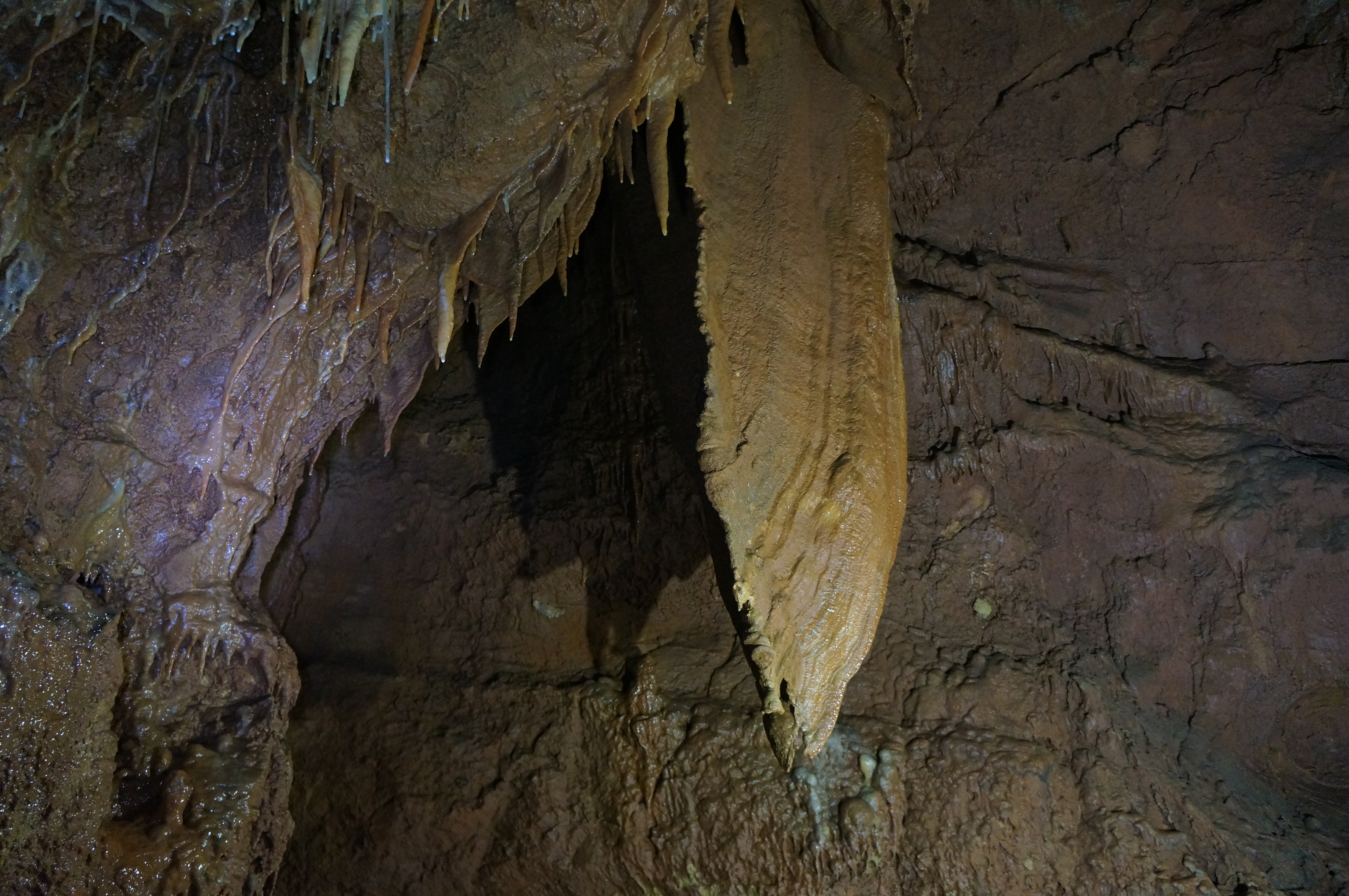 Foto scattata da L. Tringali, rappresenta la gigantesca stalattite a vela, alta oltre 3 metri, presente nella seconda sala della Grotta Regina.